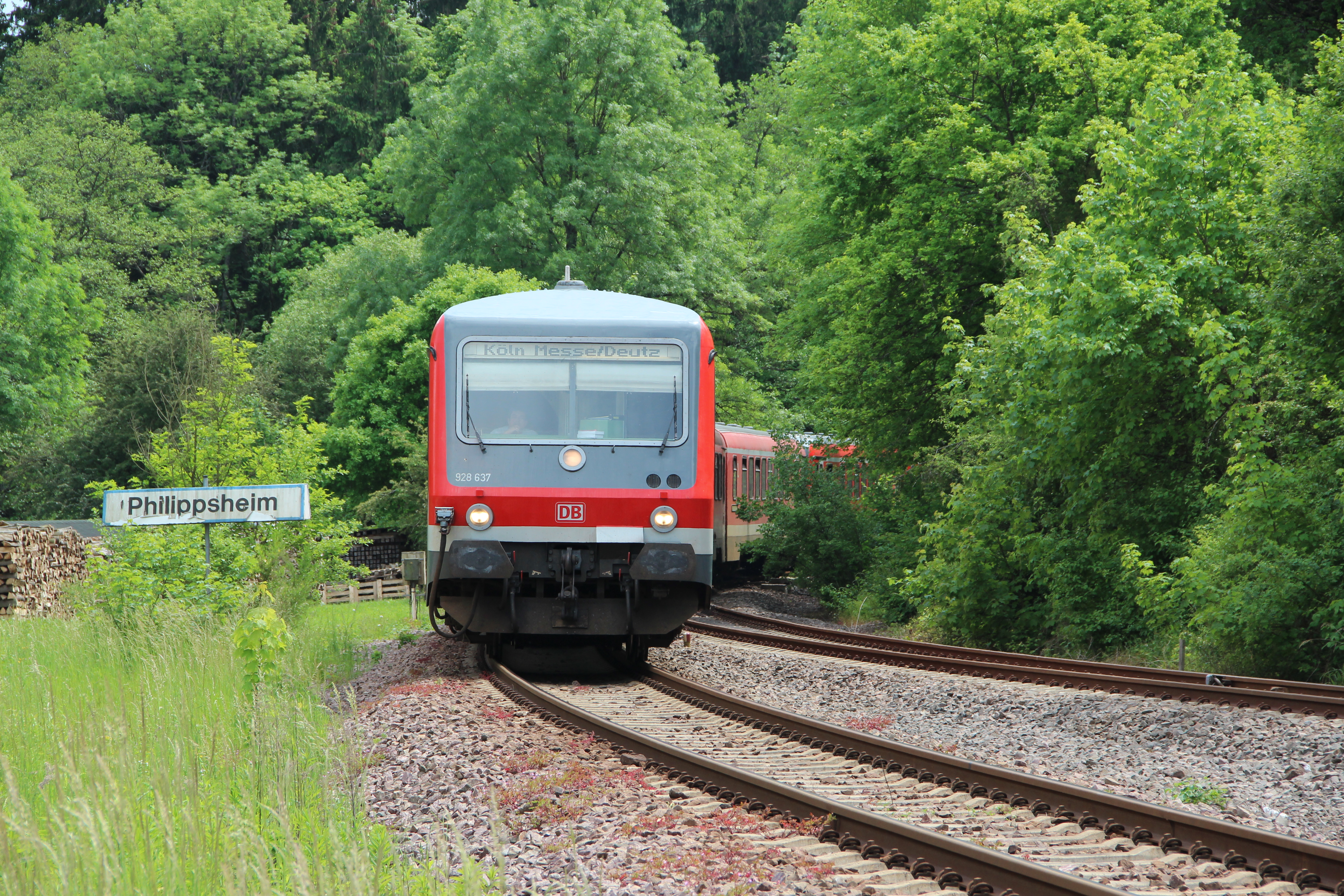 Bahnhof by Niederkasseler